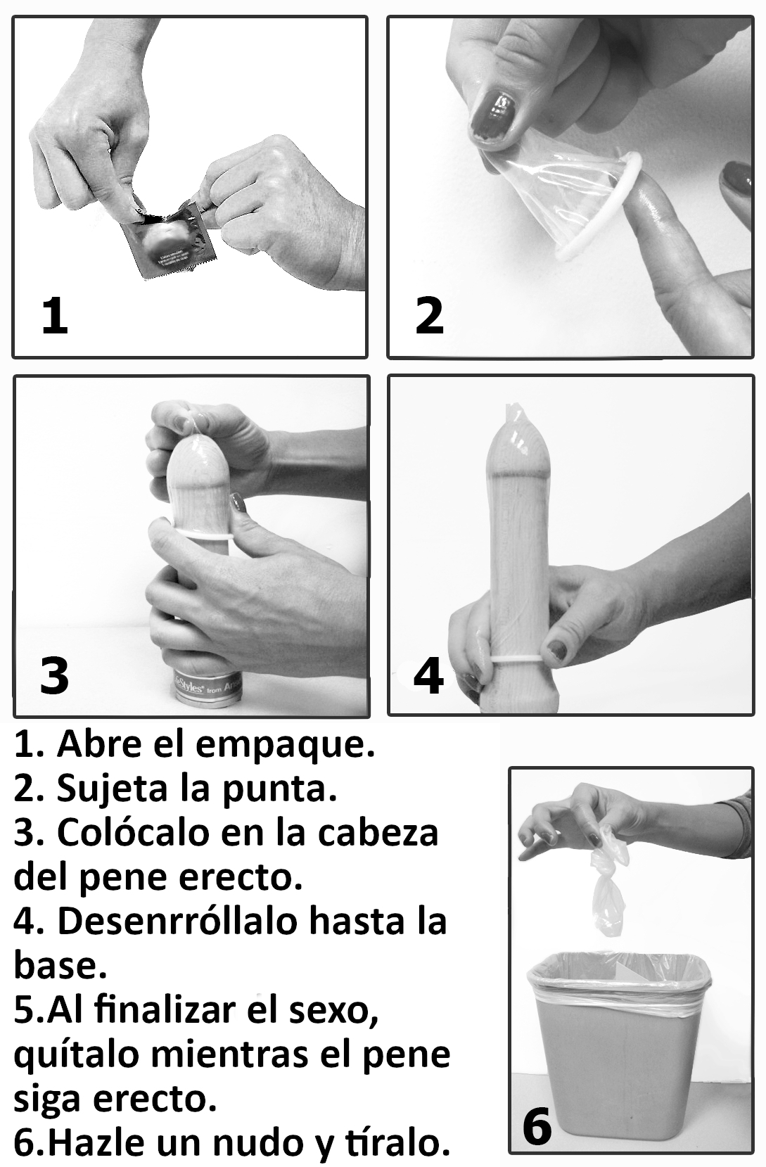 Instrucciones en español para utilizar el condón.